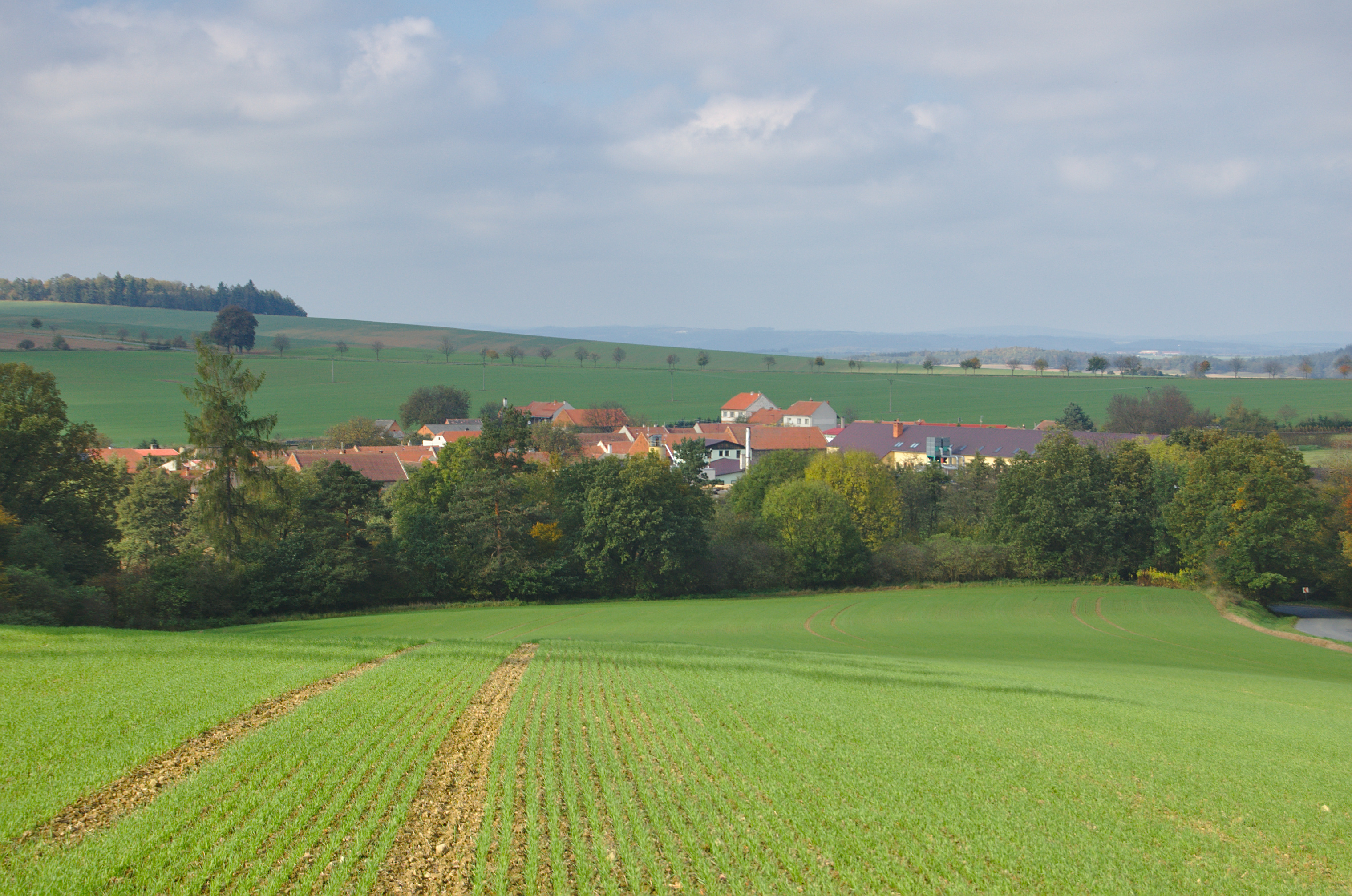 Pohled na obec od jihu, Křenůvky, Myslejovice, okres Prostějov